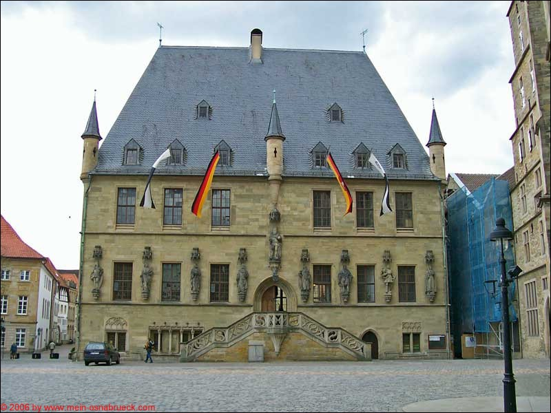 Osnabrücker Rathaus